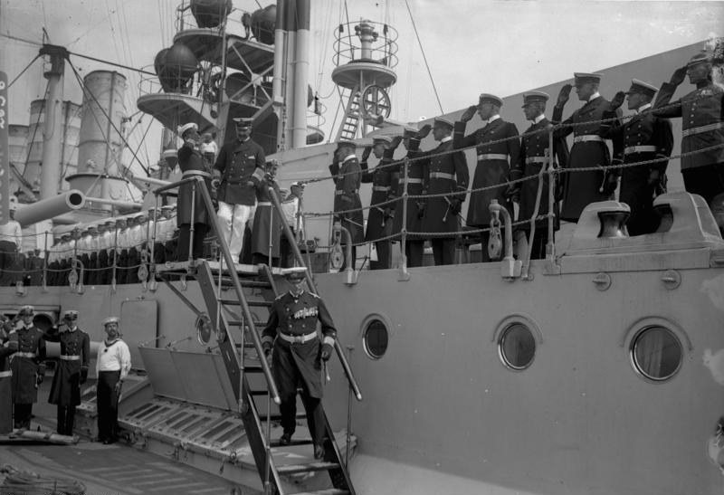 Linienschiff Oldenburg, Kaiser Wilhelm II. Oldenburg, Linienschiff, Stapell.: 30.6.1910 Der Kaiser geht von Bord [Linienschiff Oldenburg, Kaiser Wilhelm II. beim Verlassen des Schiffes, angetretene Mannschaft beim Salutieren] Abgebildete Personen: Wilhelm II.: Deutsches Reich, Kaiser, II., Deutschland